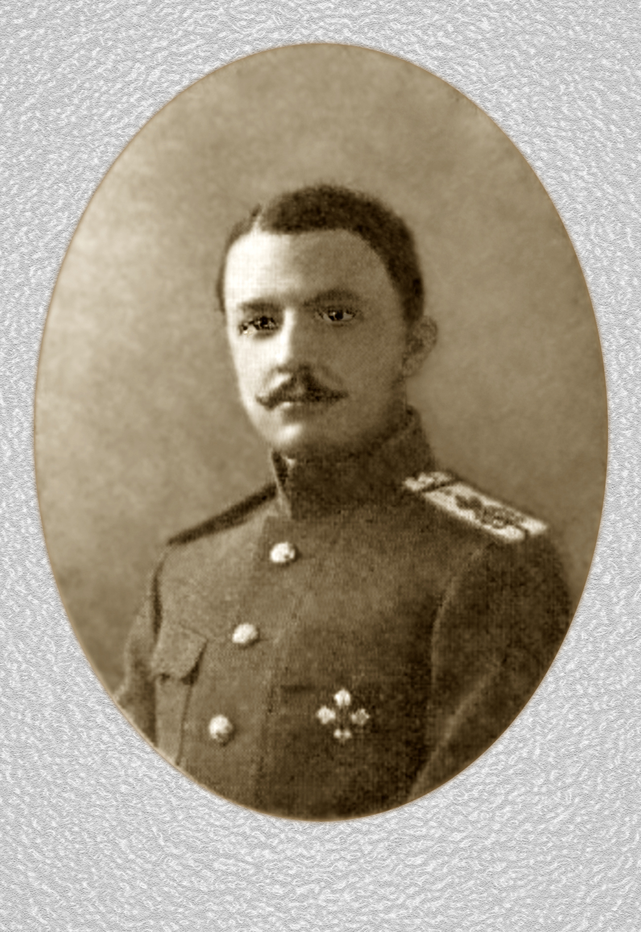 профессор Ленинградского Педиатрического медицинского института Александр Фёдорович Тур в годы учёбы в ВМА.